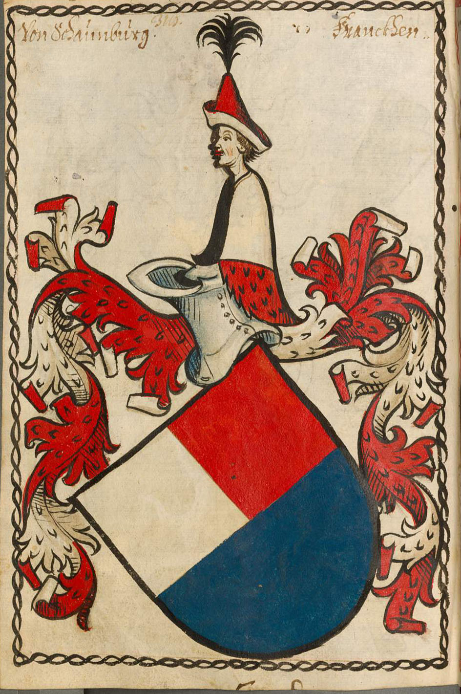 Scheibler'sches Wappenbuch, älterer Teil Von Schaunburg Franckhen